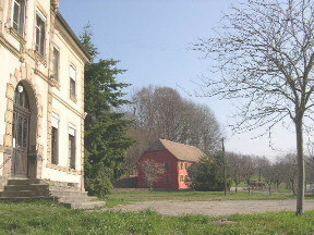 Leval (Territoire de Belfort) Photo prise le 02/04/2004 par LP90 LP90 le 02/04/2004